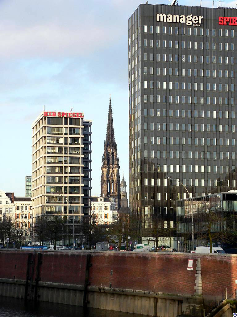 ehemalige Verlagsbauten der Spiegelgruppe in Hamburg, Willy-Brandt-Straße (früher Ost-West-Straße) / Brandstwiete.